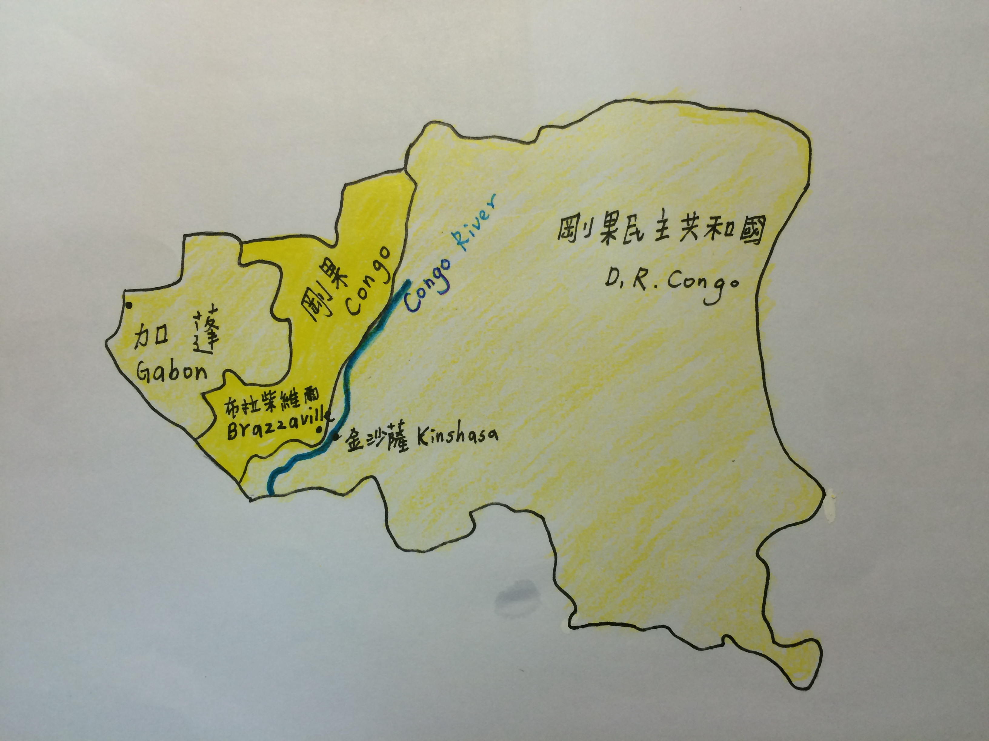 巴特克人沿著剛果河中段居住，少部分居住在加彭